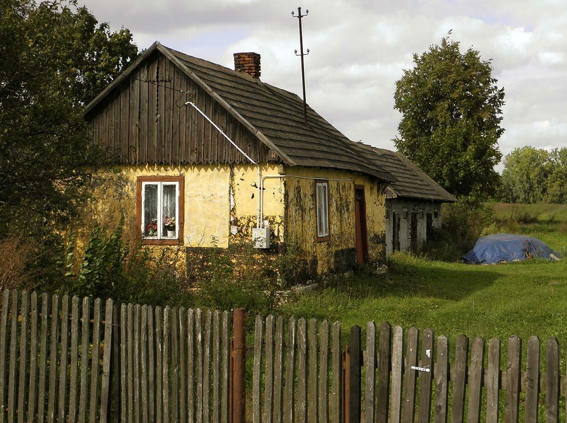 Kuźnia - dom nr 14.